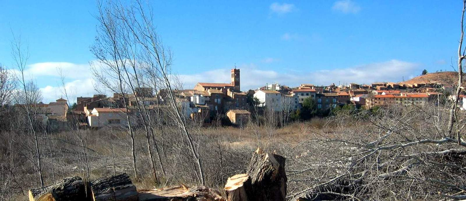 Vista parcial (oriental) de Torrebaja (Valencia), desde el camino del Rento (2006).